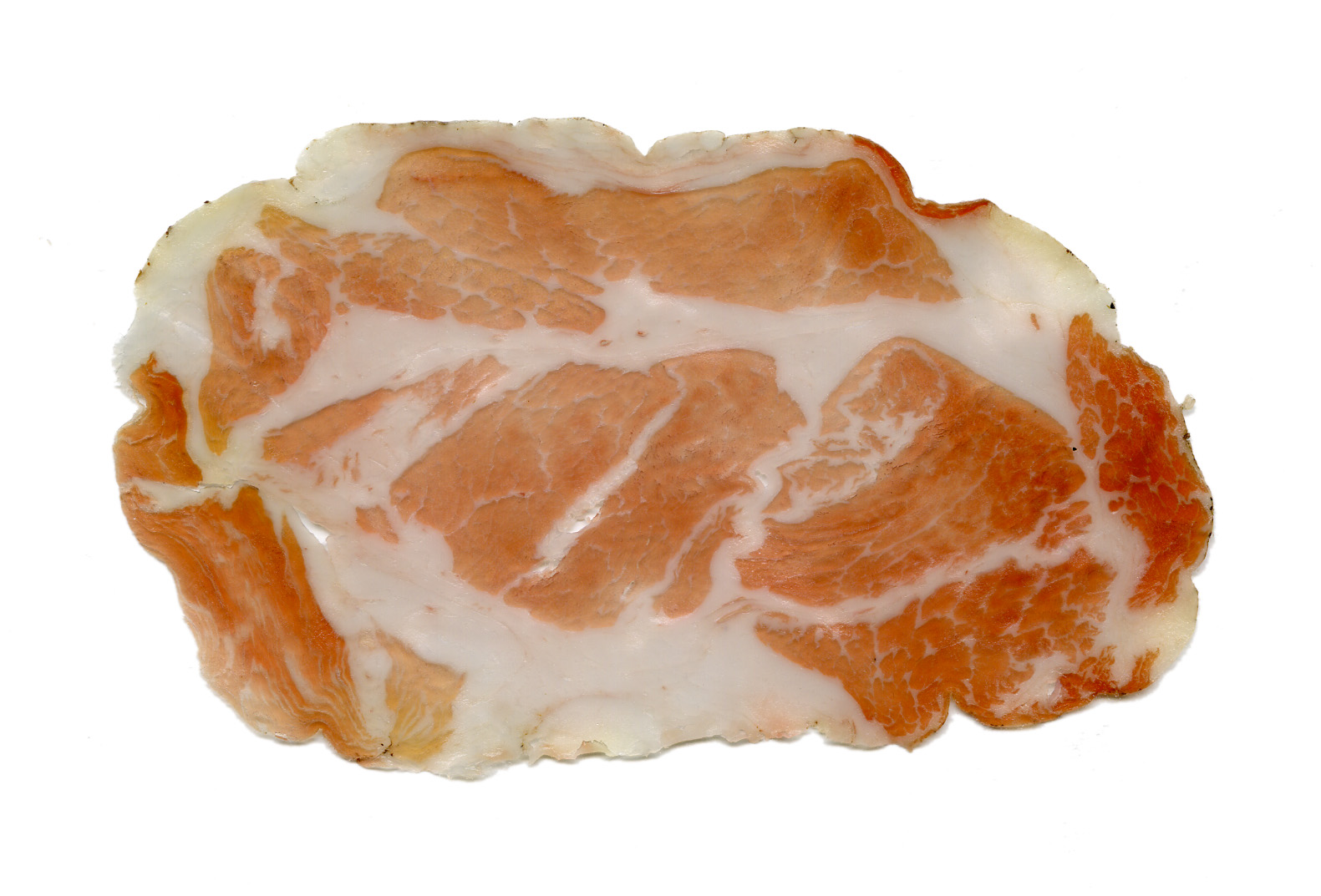 Italienische Coppa. Eigene Aufnahme, GNU FDL